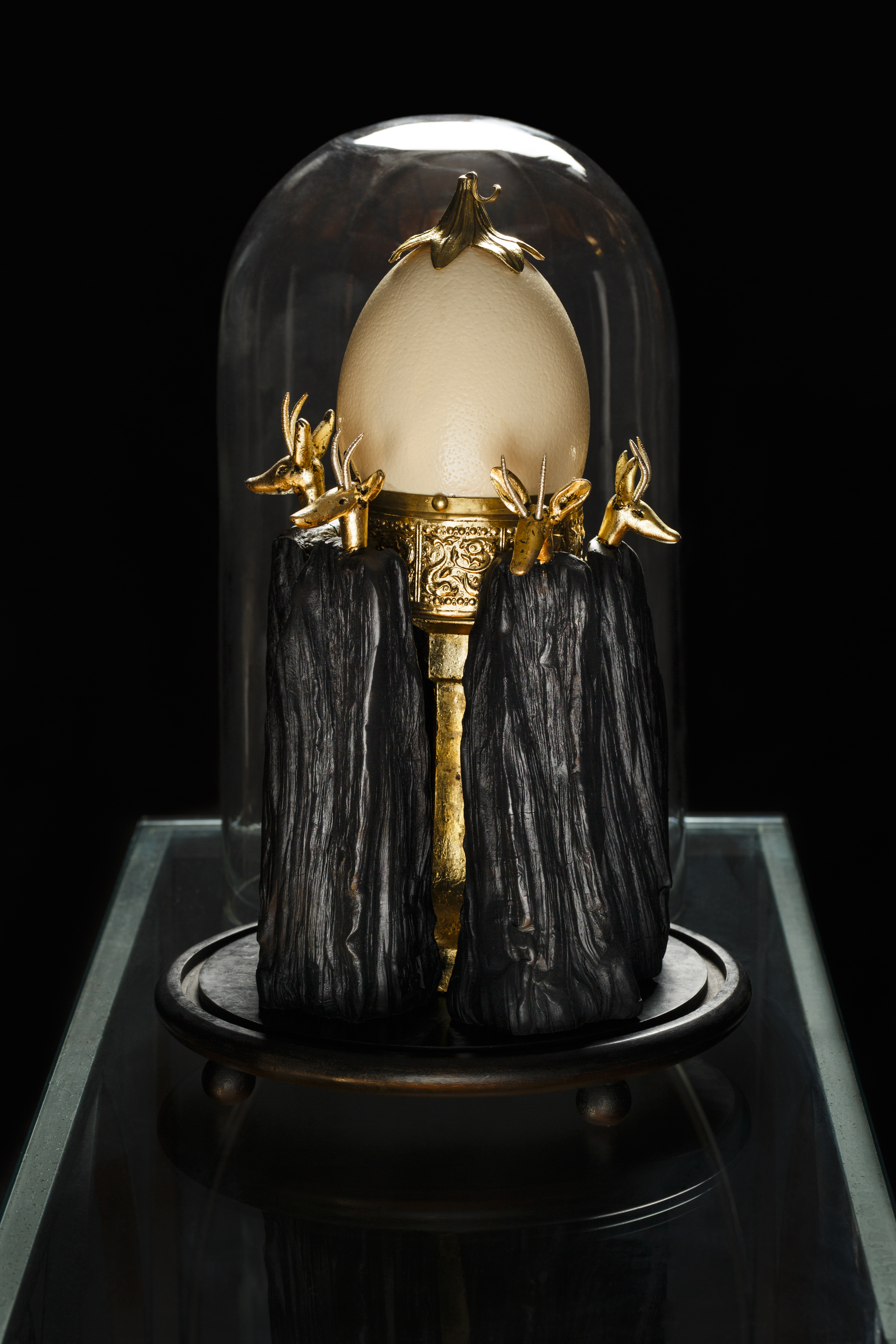 Photo de Cédric Bossard Œuvre de Jean Divry